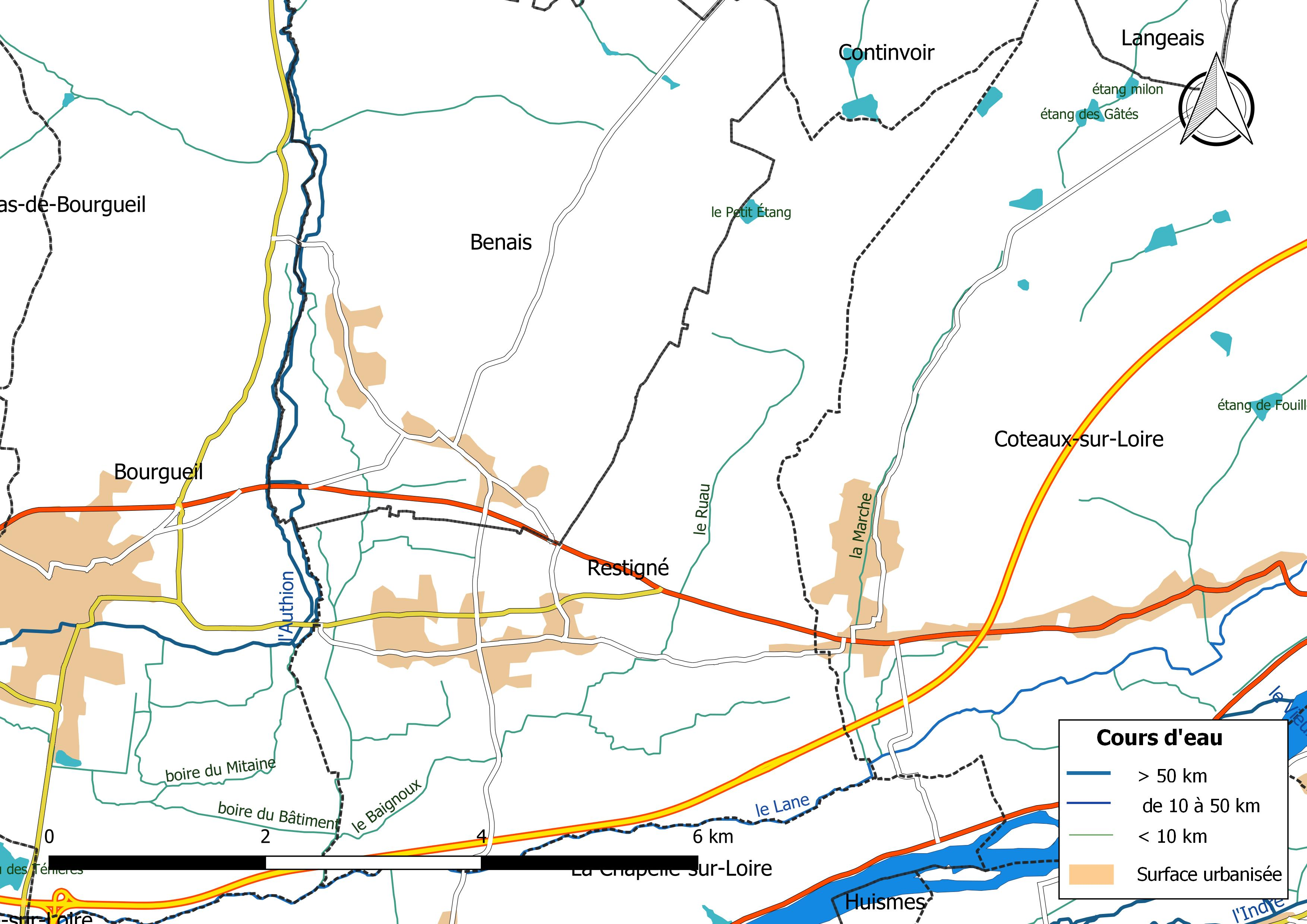 Carte du réseau hydrographique de la commune de Restigné (France).